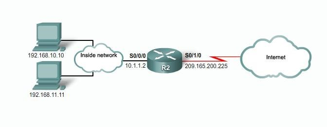 Монгол: J.IN12D059